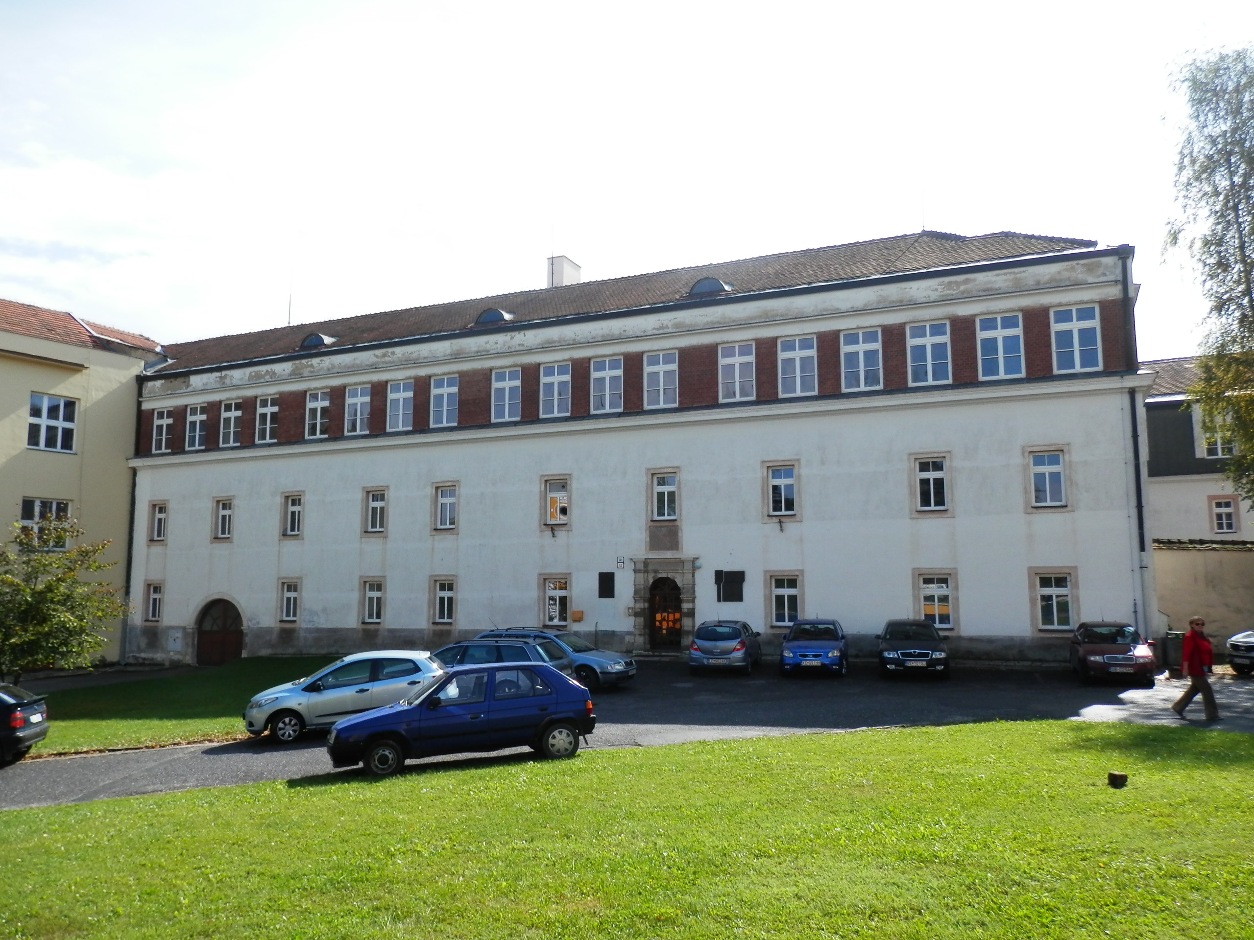 Kňazský seminár. Doba vzniku v roku 1647. Spišská Kapitula-Spišské Podhradie.